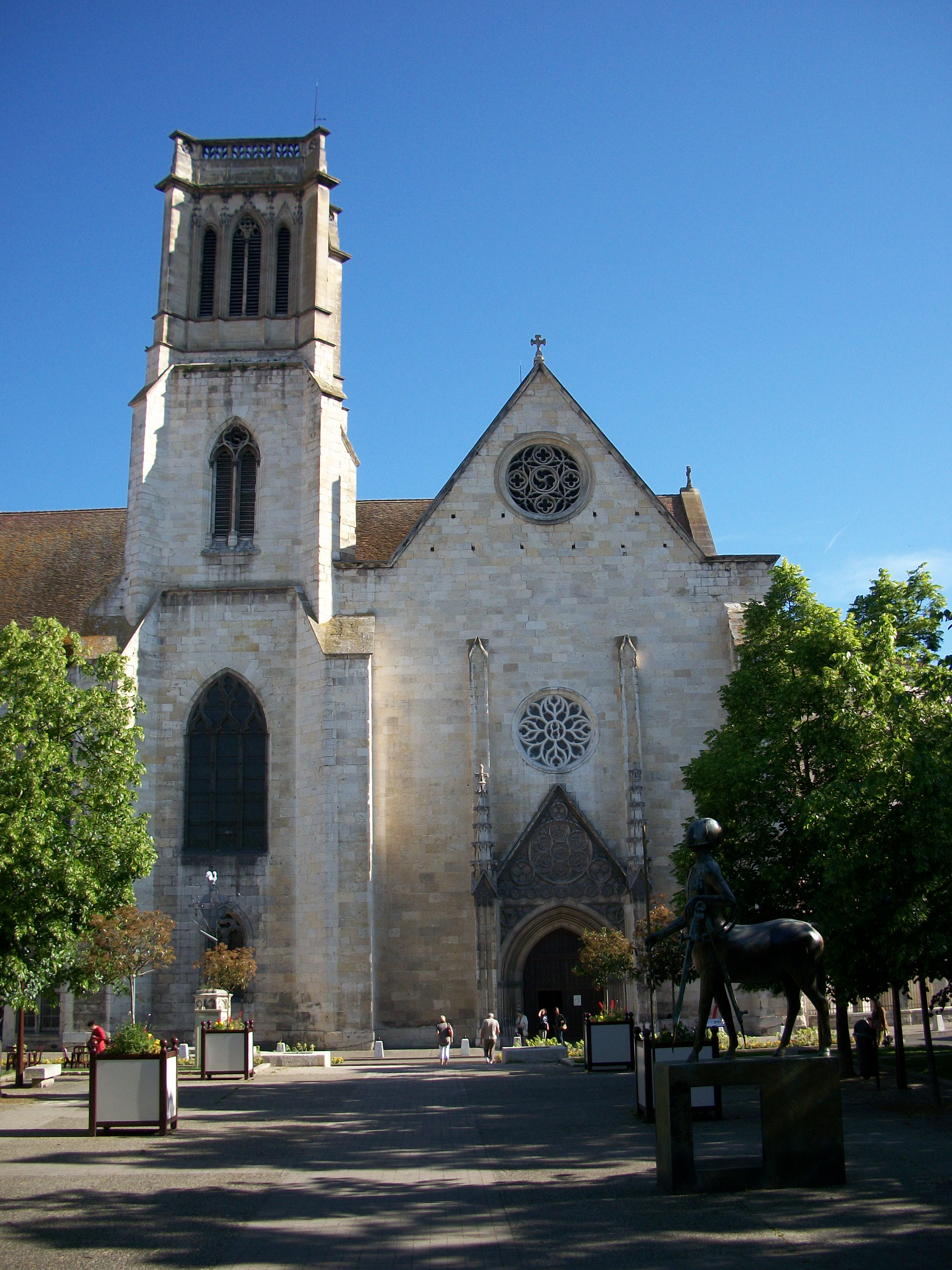 Cathédrale Saint-Caprais d'Agen (Lot-et-Garonne)